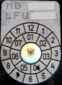 Austrian decal for vehicle inspection -- Begutachtungsplakette (Pickerl) Österreich